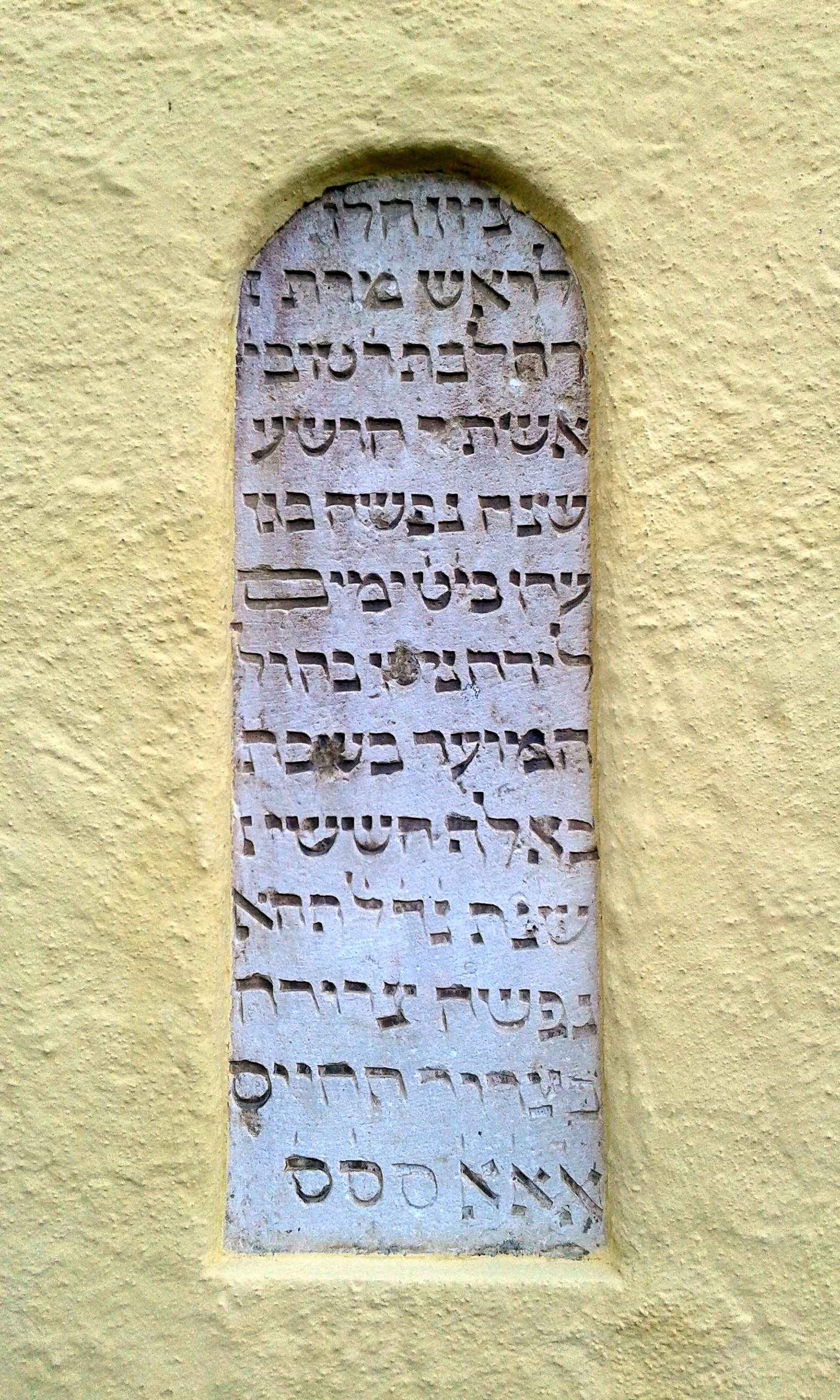 Sankt Martin im Innkreis, jüdischer Gedenkstein (mit 17. April 1294 datiert) an der südlichen Kirchenmauer der Pfarrkirche Sankt Martin